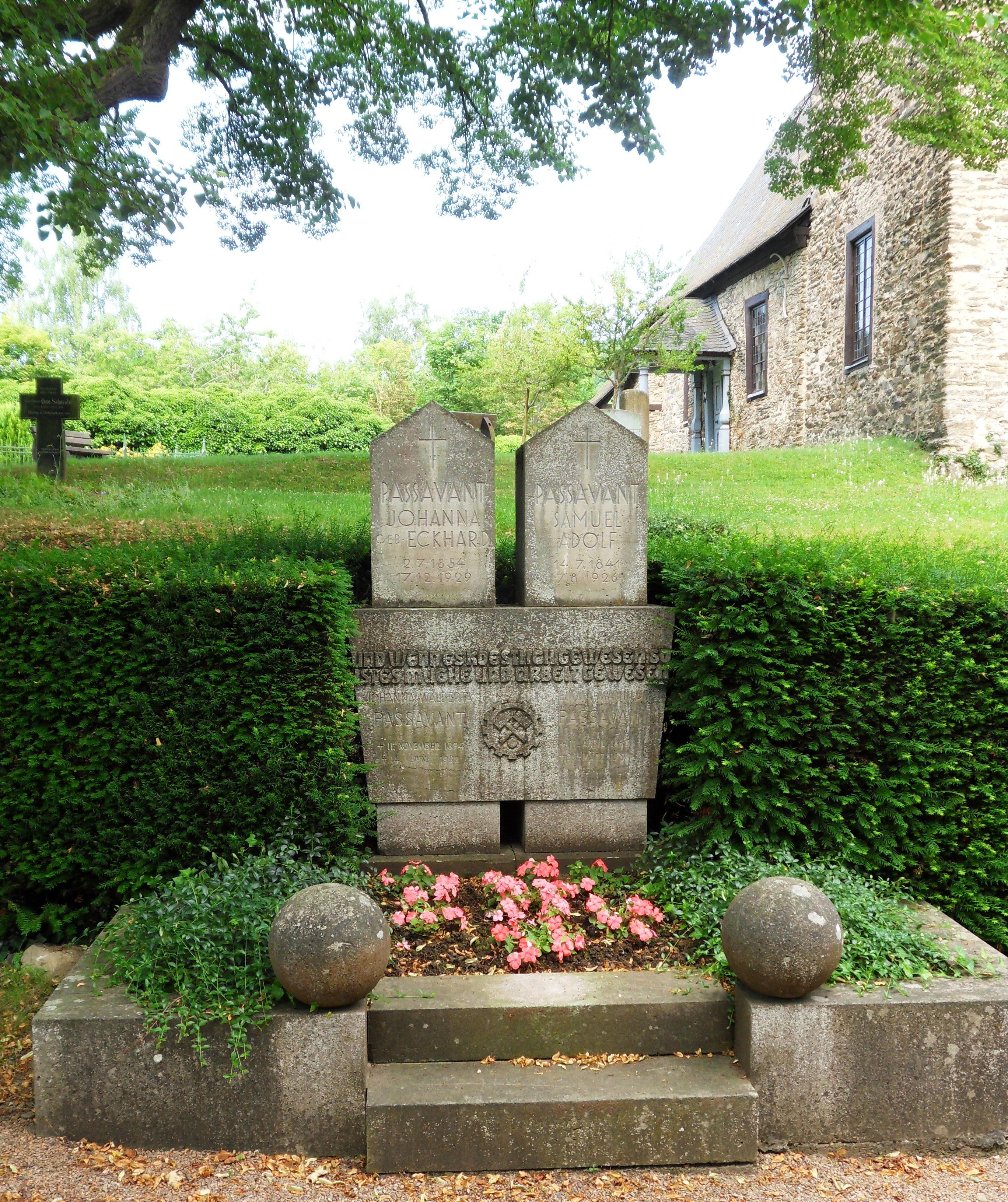 Grabmal von Adolf Samuel Passavant auf dem Friedhof der Alten Pfarrkirche in Michelbach